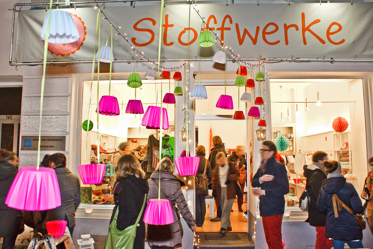 Dekoration zum Einkaufsabend "Flingern at night. Ackerstraße, Düsseldorf-Flingern